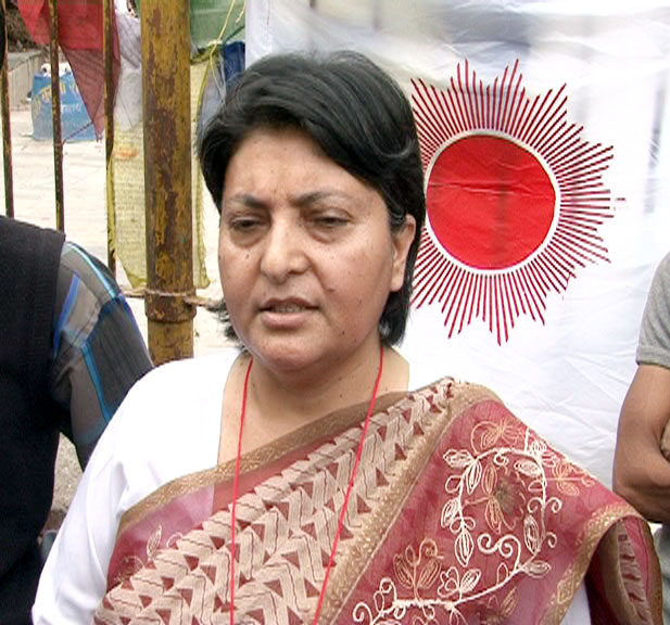 नेपाली: विद्यादेवी भण्डारी